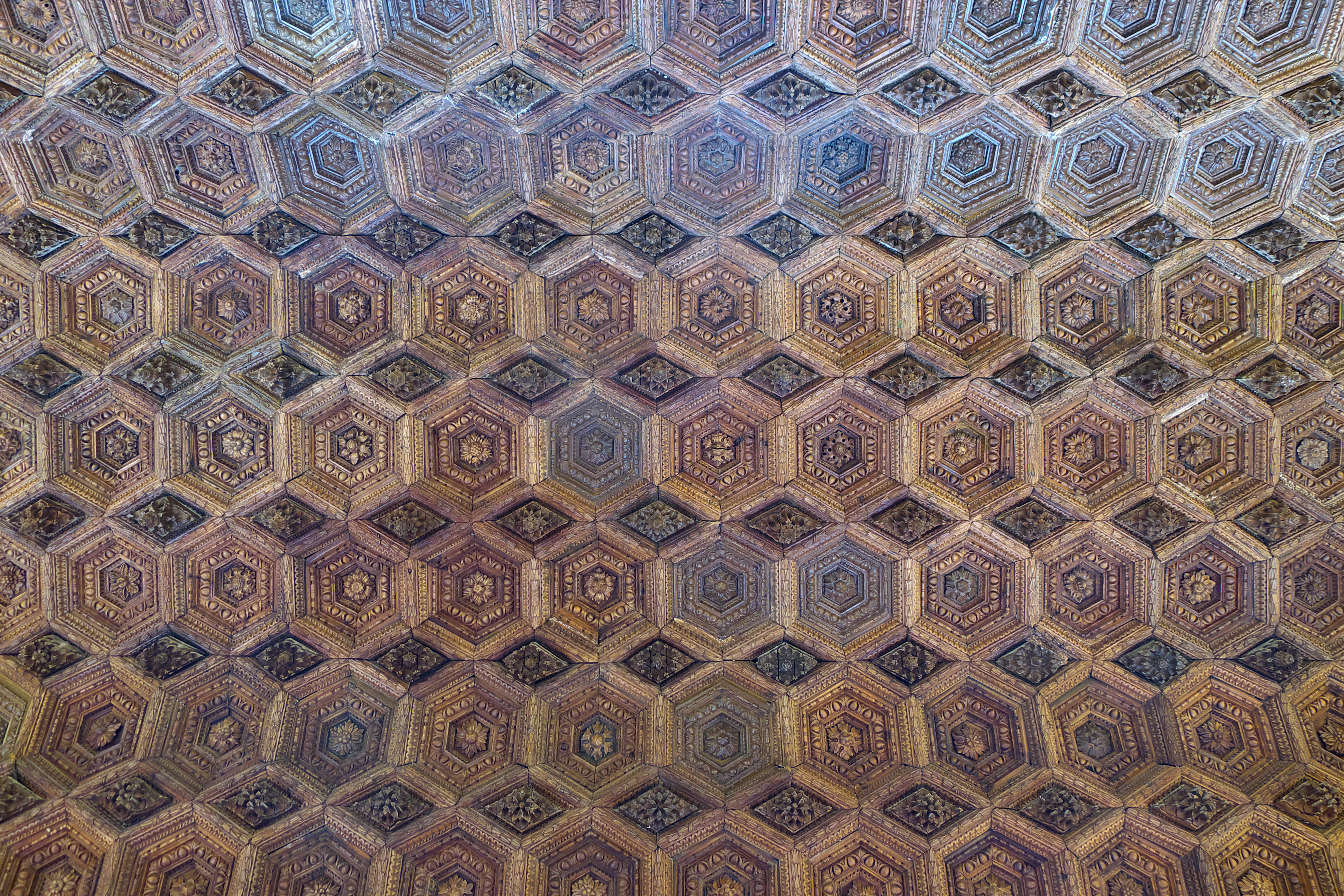 Uno de los magníficos artesonados del palacio.